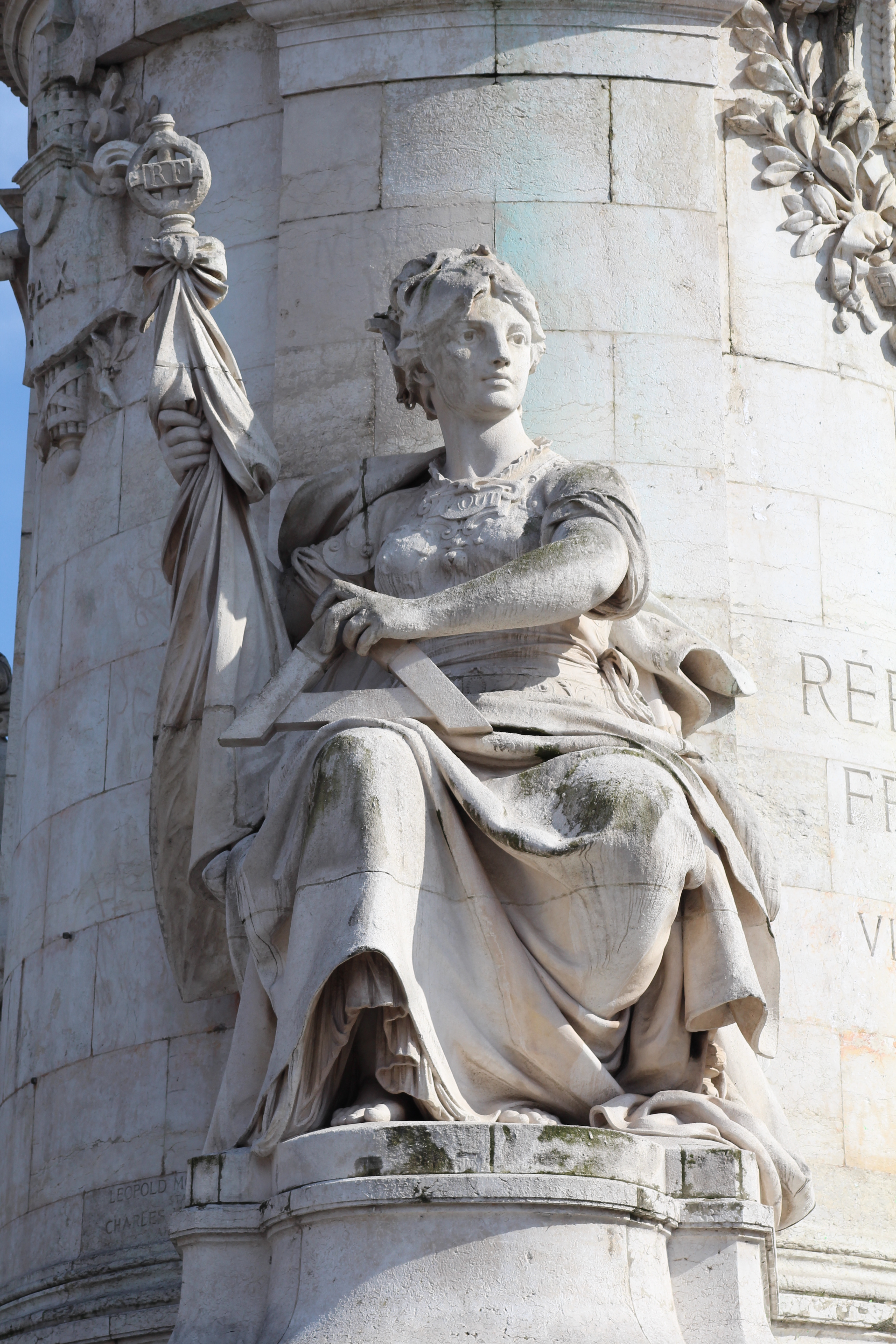 Statue de l'Égalité, Monument à la République, Paris.